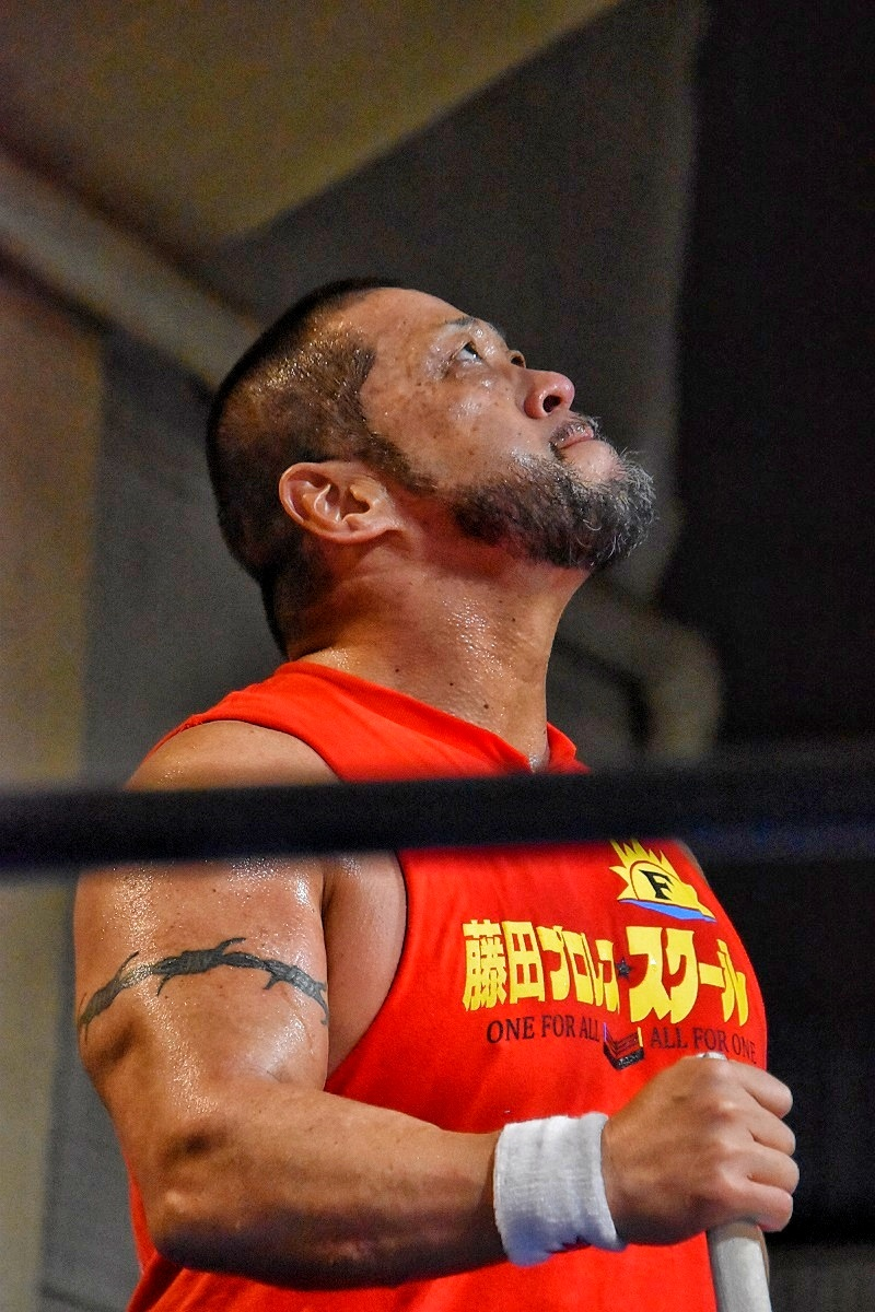 プロレスラーのディック東郷選手